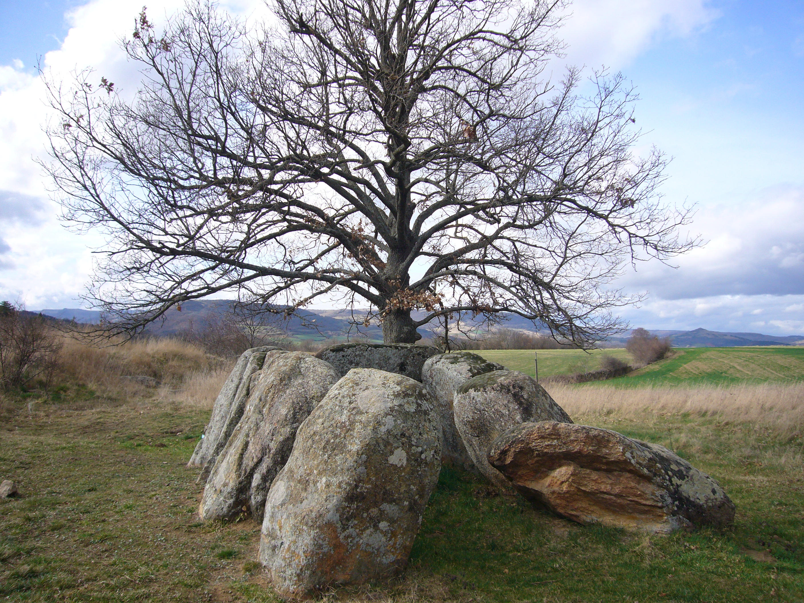 Dolmen de l'ousteau du loup, près d'Unsac